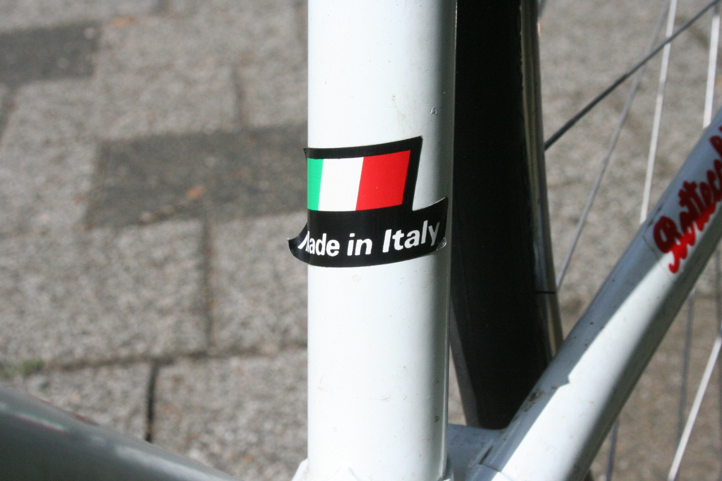 "Made in Italy" Brand at a Bottecchia frame